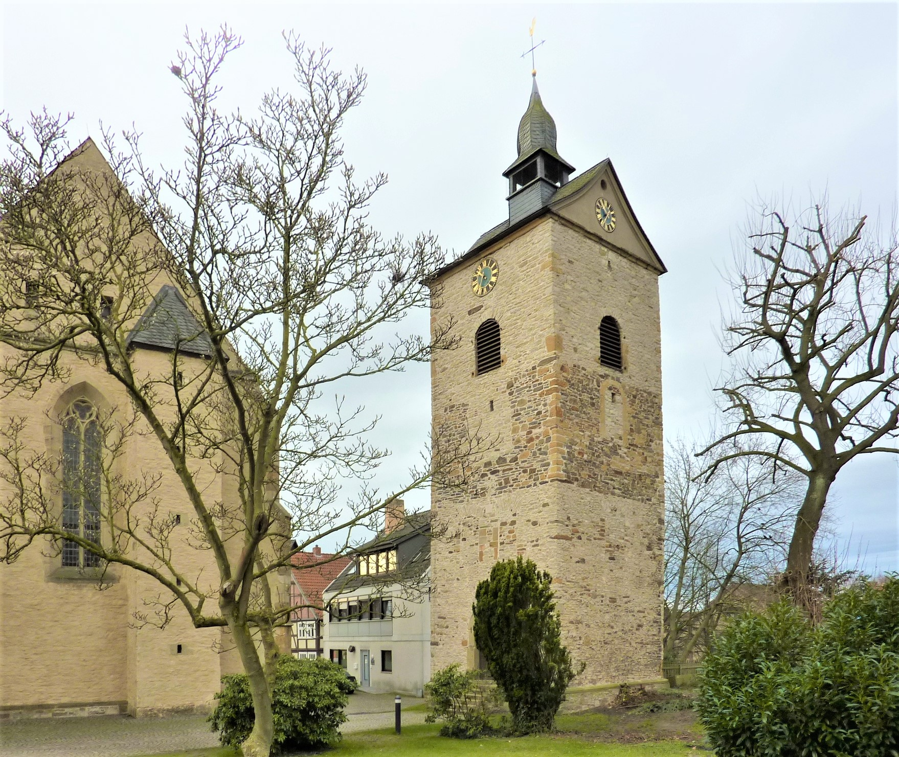 Stiftskirche Enger